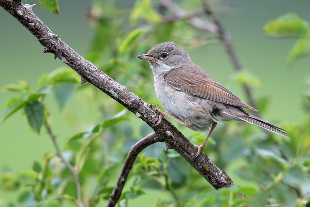 Dorngrasmücke in der Nähe des Ilkerbruchs